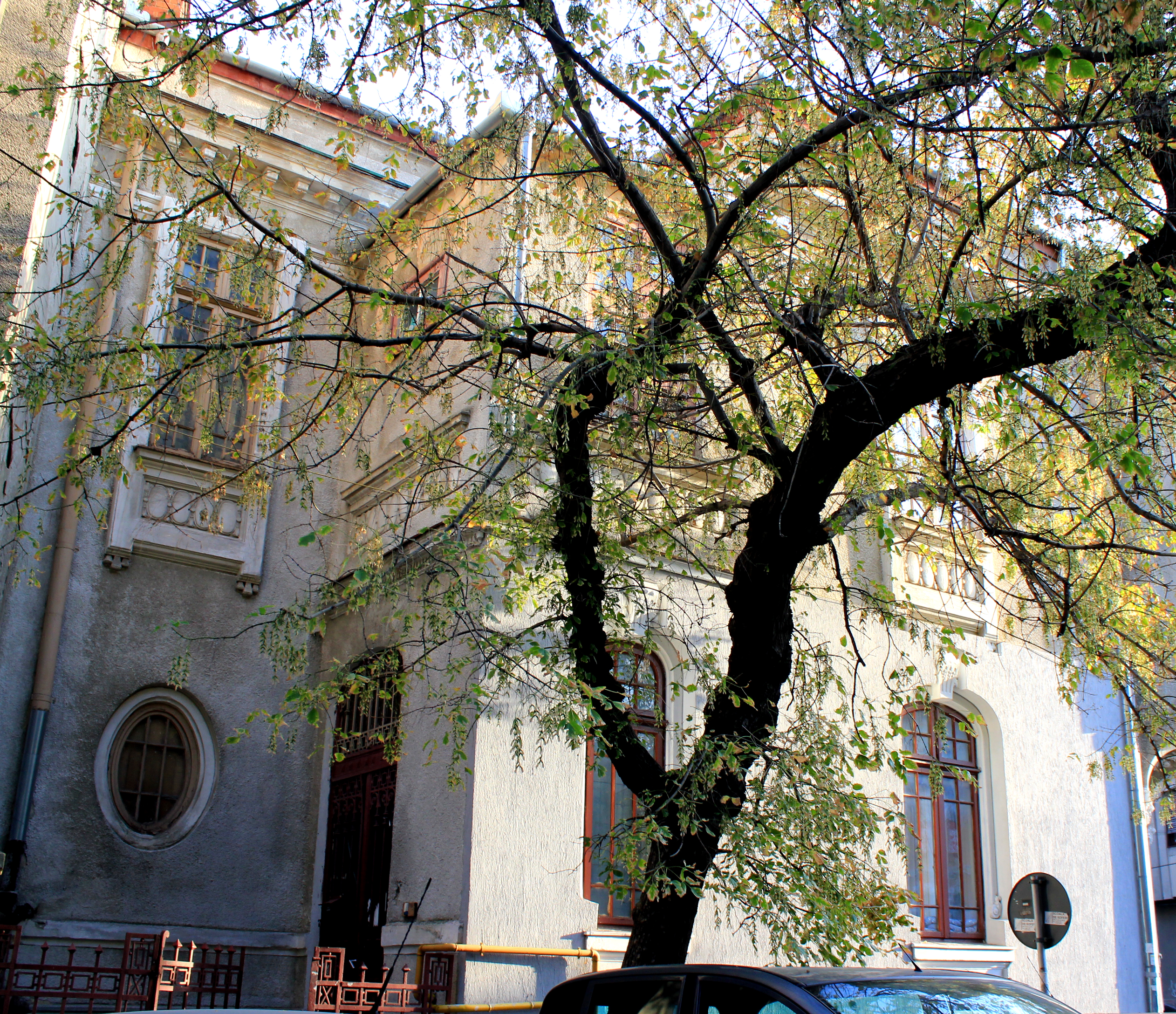 Casa Romano Alexandru 16